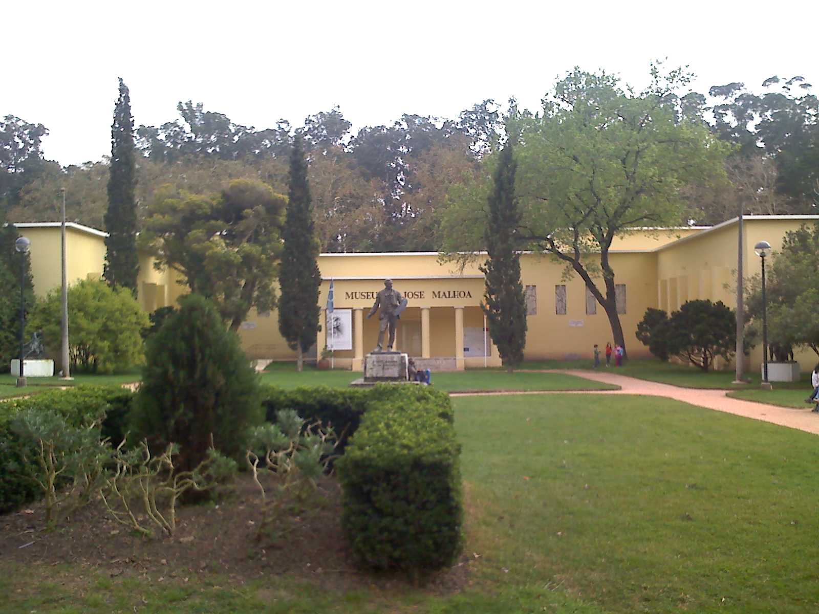 José Malhoa Museum at Caldas da Rainha (Portugal)